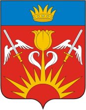 Герб Знаменска Астраханской области